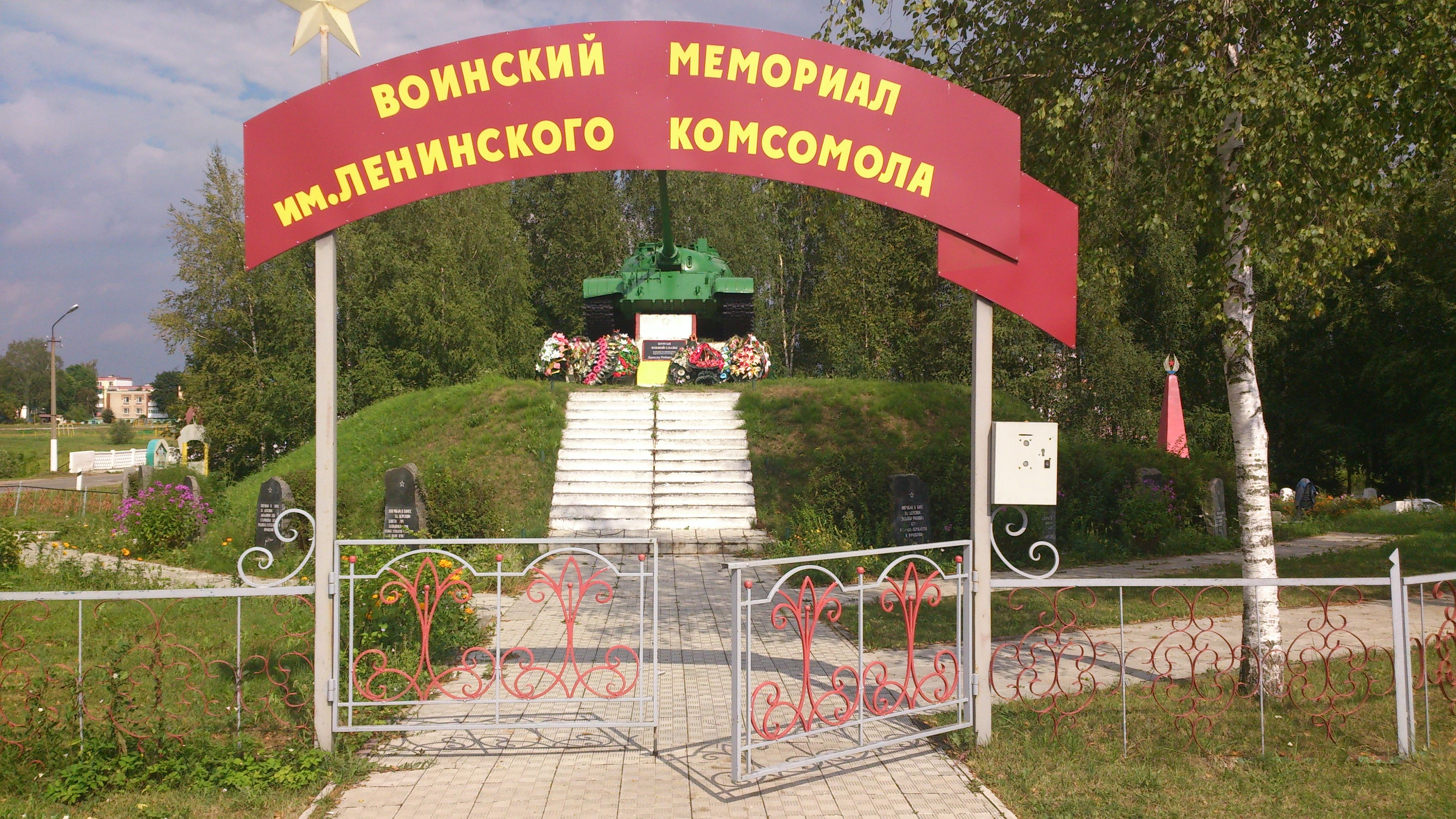 Воинский мемориал в агрогородке Копти - центральный вход